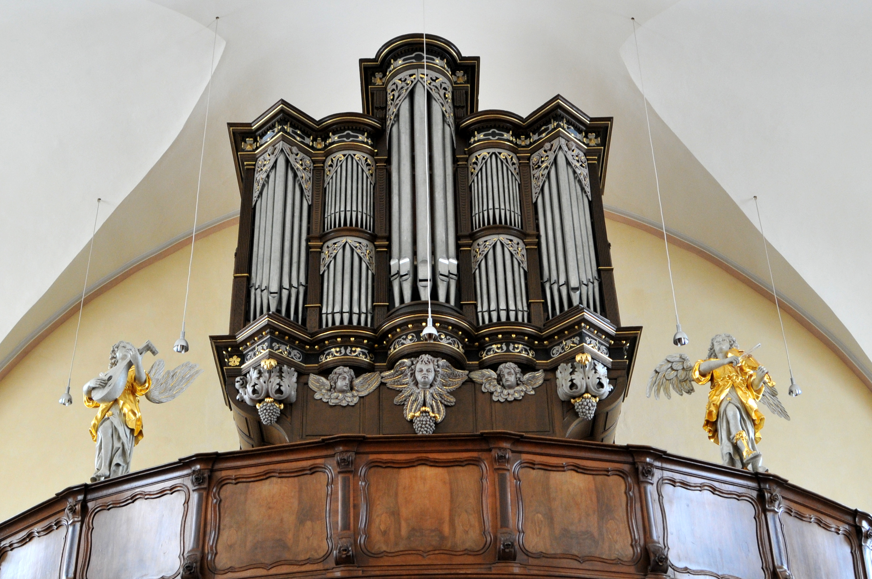 D'Uergel an der Kierch zu Jonglënster.